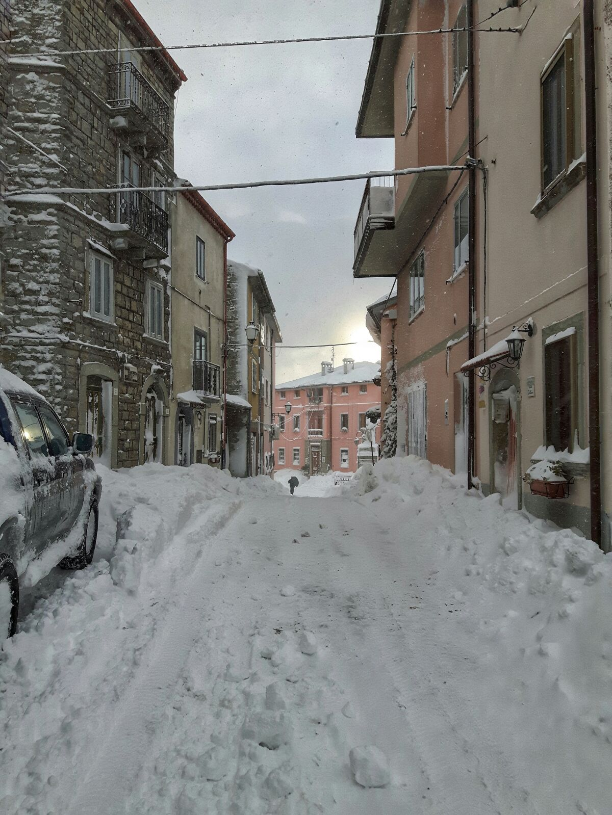 Sant'Angelo del Pesco Neve